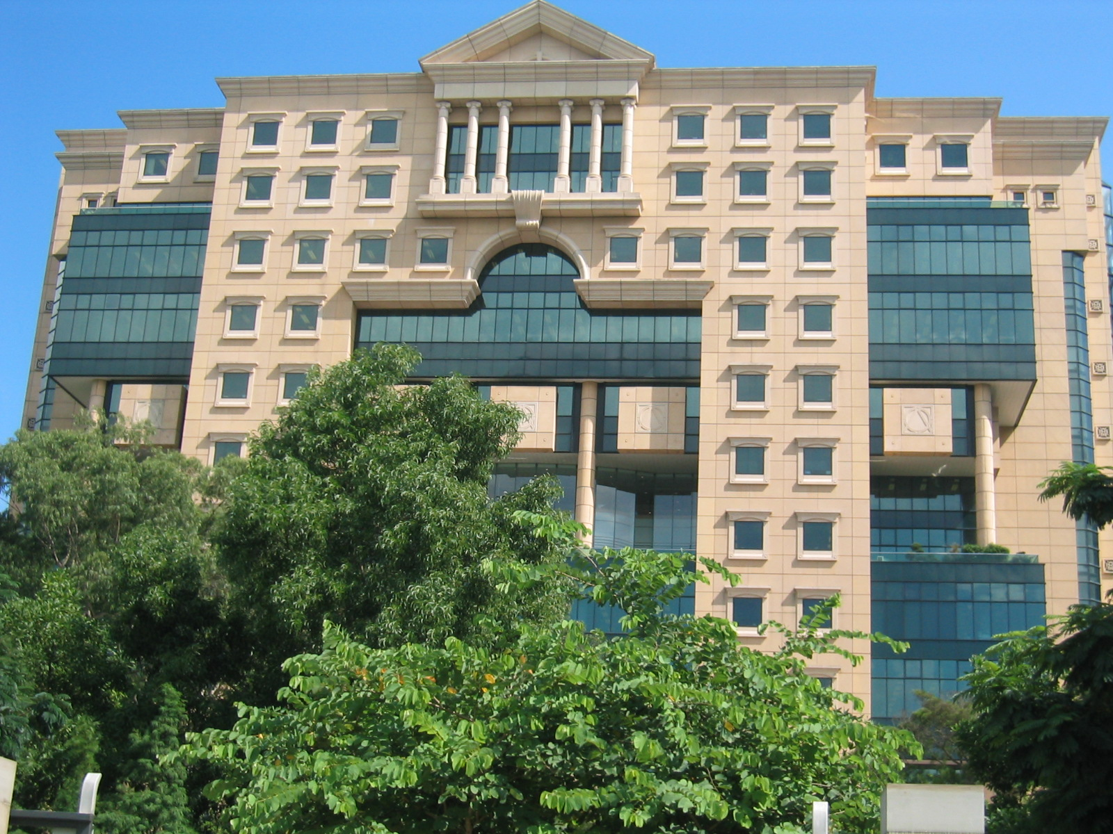 Hong Kong Central Library, Causeway Bay, Hong Kong